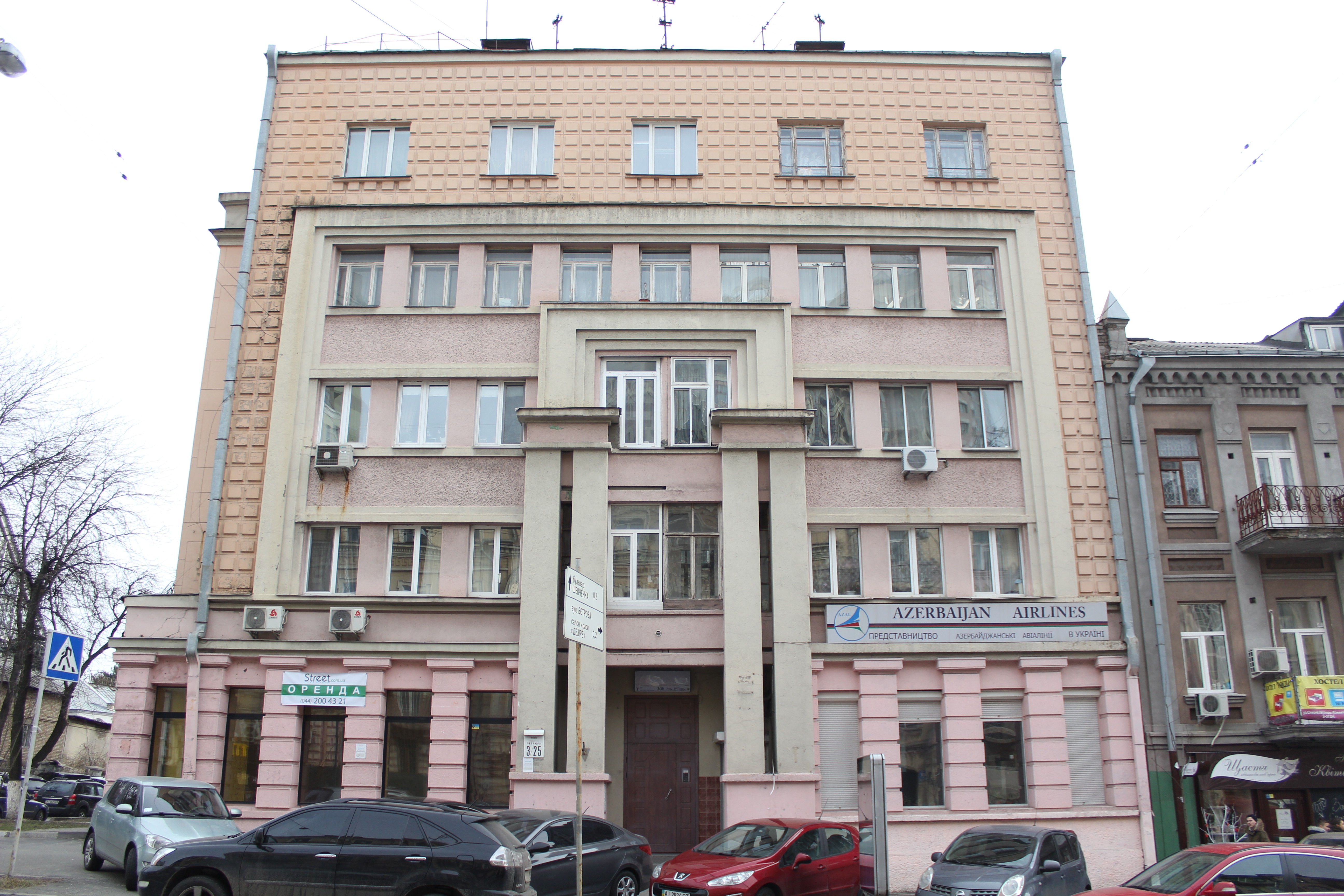 Будинок житловий працівників заводу «Транссигнал», Київ, Петлюри Симона вул., 3/25